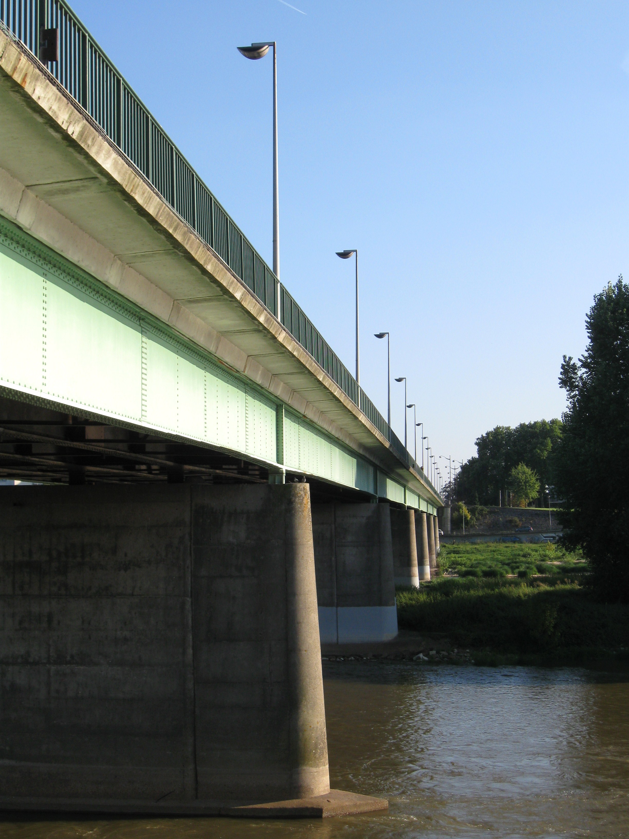 Le pont du Maréchal Joffre sur la Loire, Orléans, Loiret, France